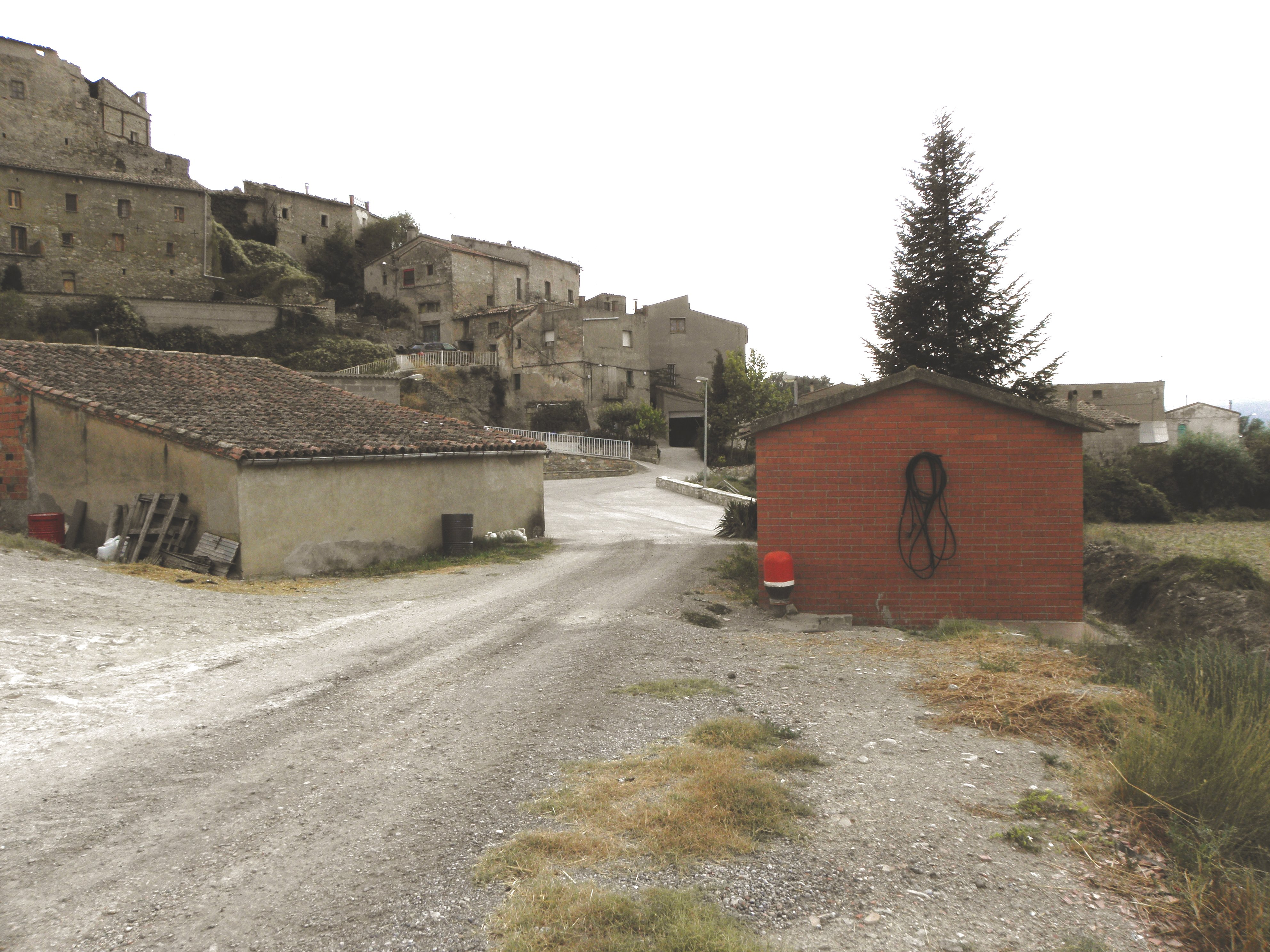 Enfesta (La Molsosa, Solsonès). En primer terme, la nova església (1979)